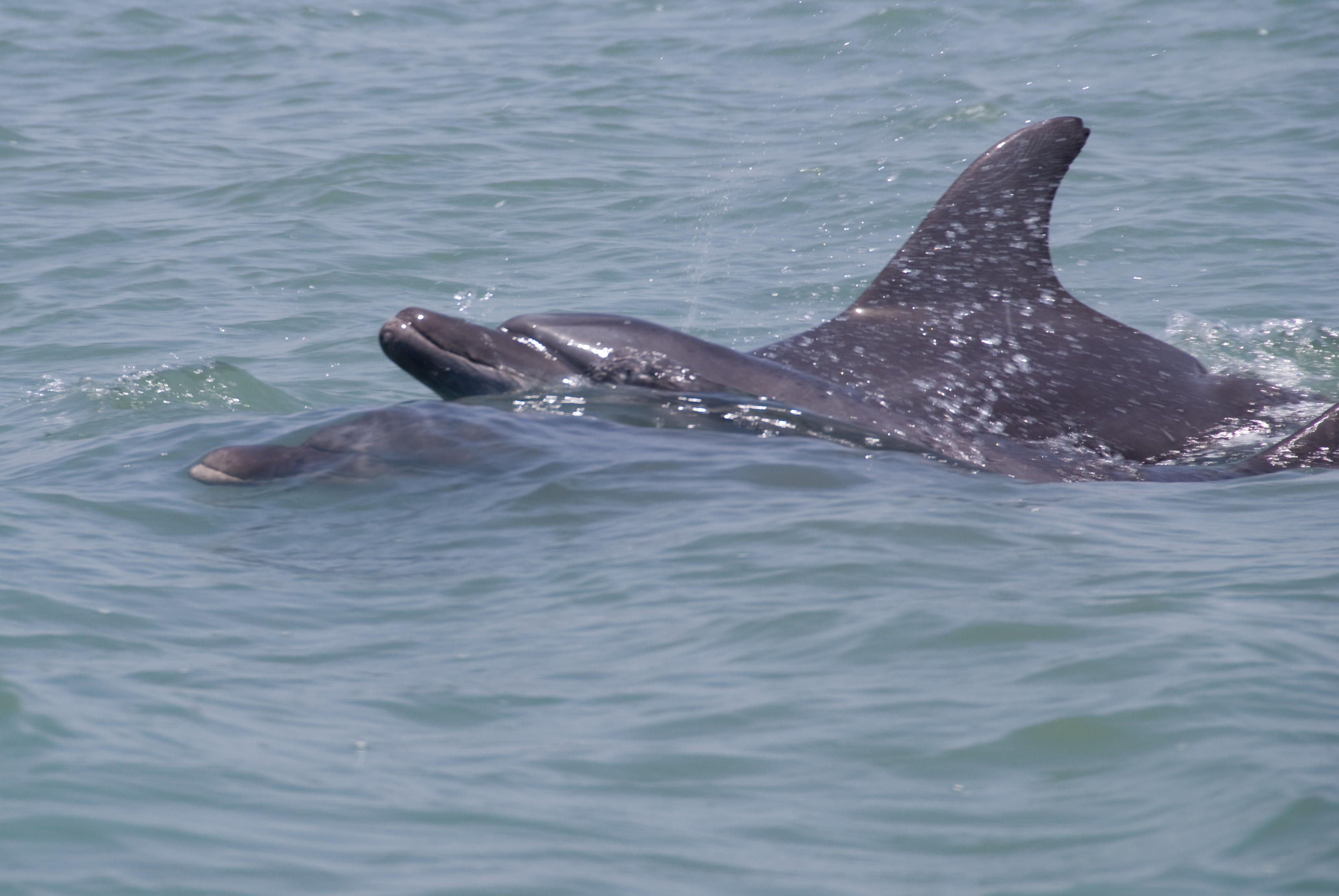 Dauphins dans le fleuve Casamance, près d'Oussouye (Sénégal)